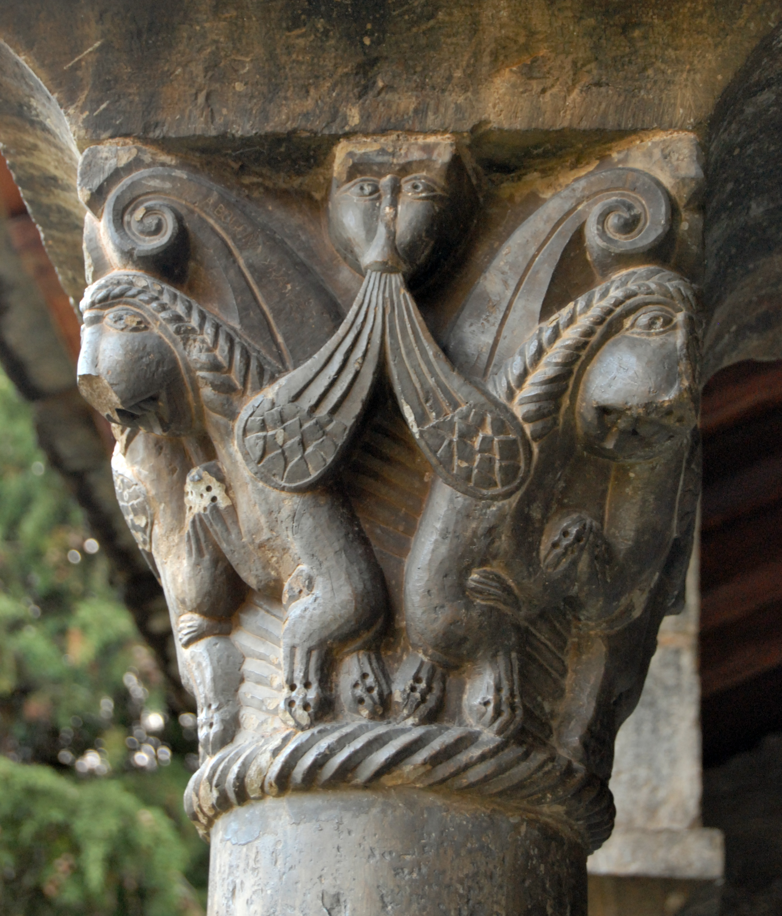 Esglesia de Sant Jaume de Queralbs